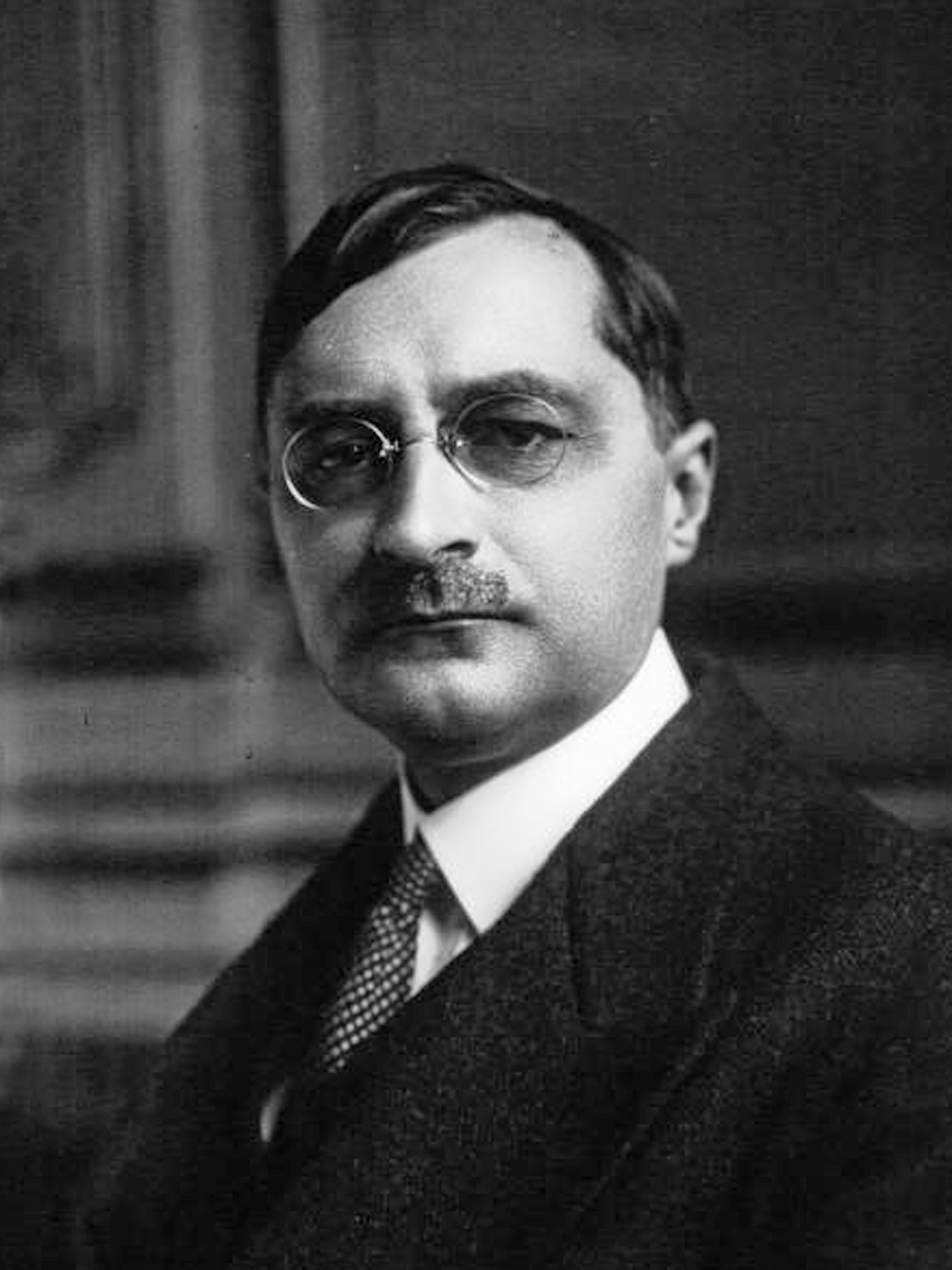 M. Marcel Heraud, sous-secrétaire à la Présidence du Conseil (portrait) [photographie de presse]